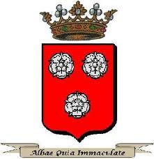 Armoiries de la famille de Saboulin Bollena